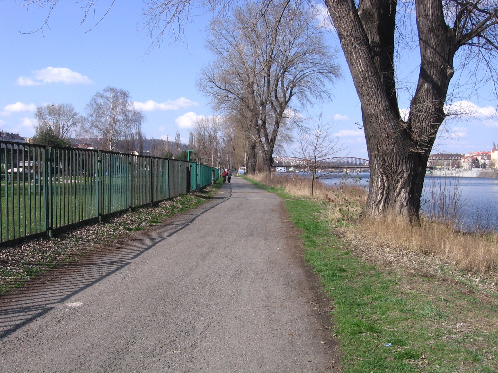 Ostrov Císařská louka, pohled k severu